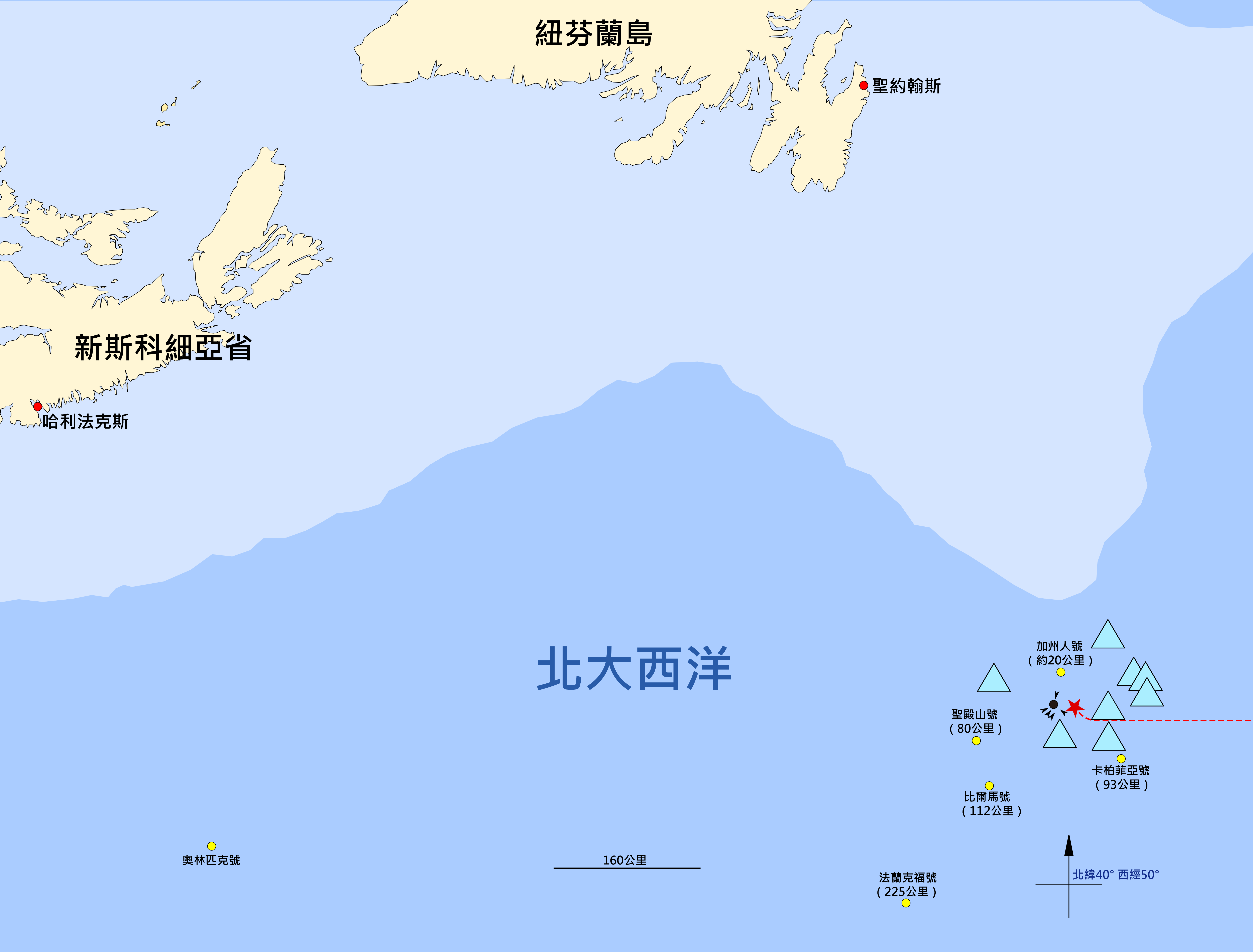 圖片為英國皇家郵輪鐵達尼號的失事地區。紅色五角星-鐵達尼號實際位置•黑點-鐵達尼號發出CQD的定位地點•水藍色三角形-冰山•黃點-其他船舶•紅點-城市